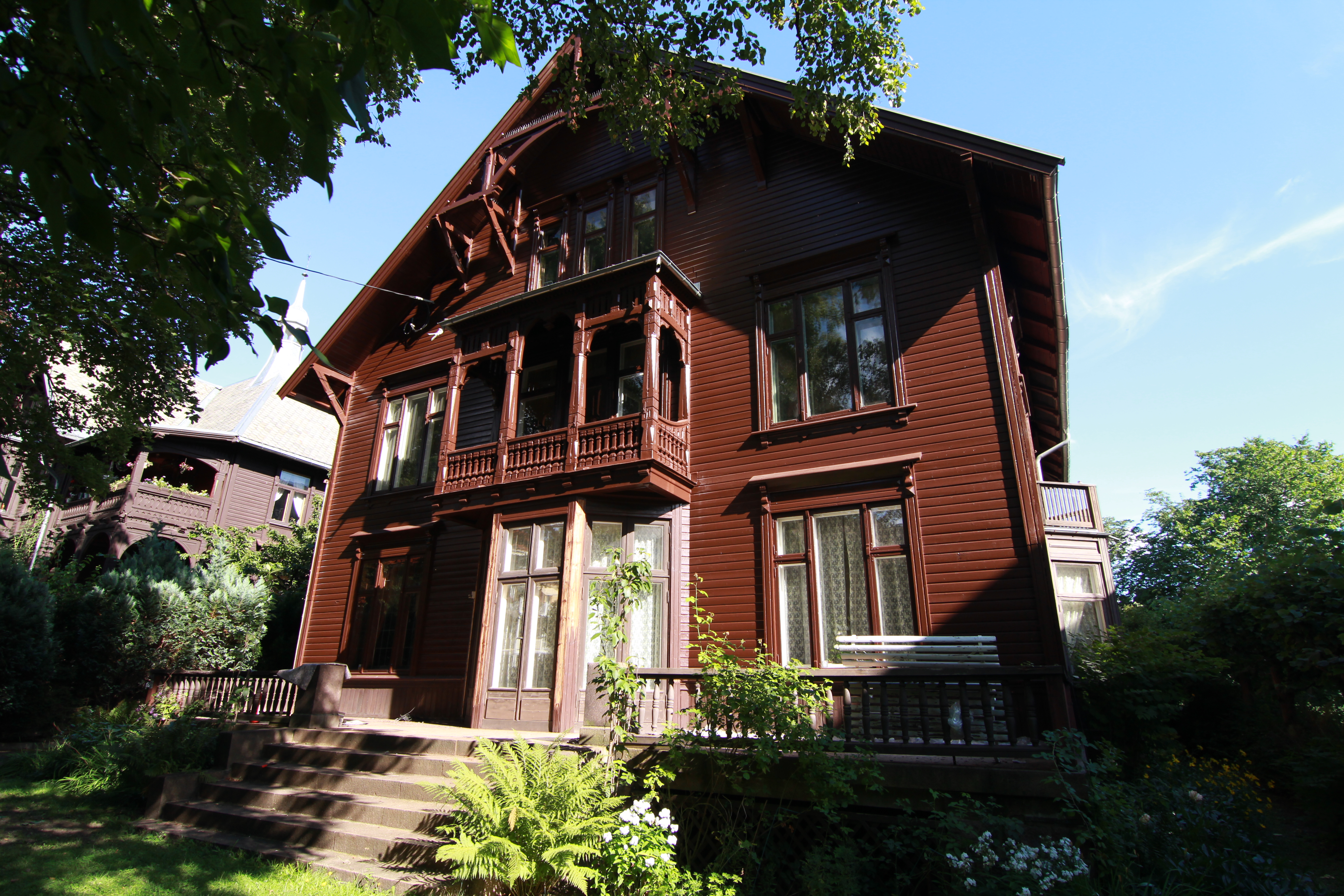 Krusesgt. 5A, Oslo.